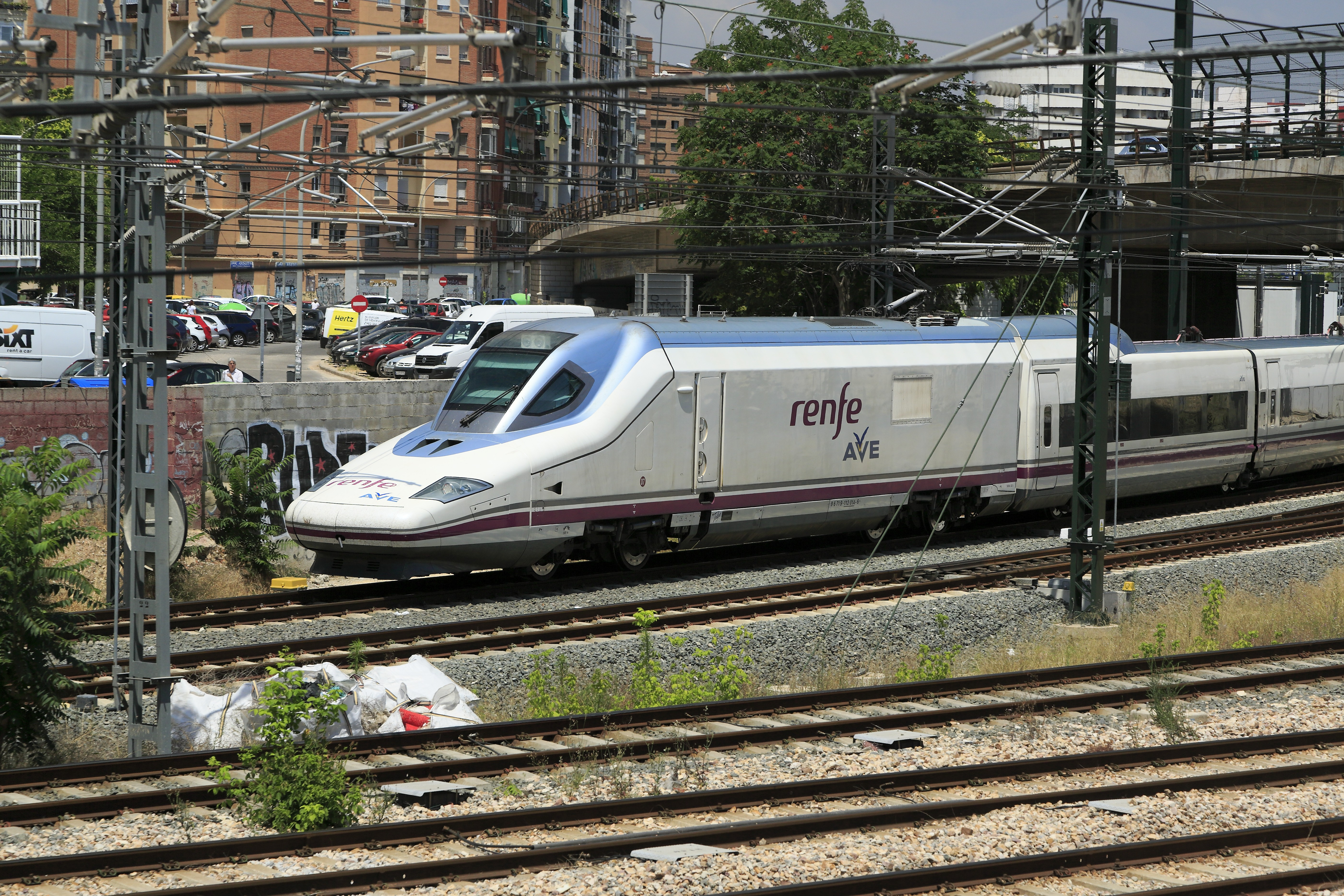 Eine Talgo-350-Einheit beim Einfahren im Bahnhof Valencia Joaquín Sorolla, Nachschuss. Im Gegensatz zu den sehr ähnlichen Maschinen der Reihe 130 ist die Betriebsnummer bei denen der Reihe 112 wie bei Lokomotiven und Triebwagen angeschrieben.